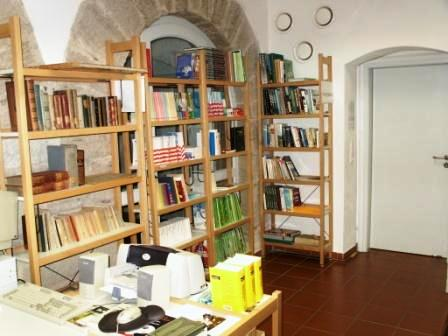 Lesesaal in der Schulbibliothekt des Hennebergischen Gymnasiums "Georg Ernst".